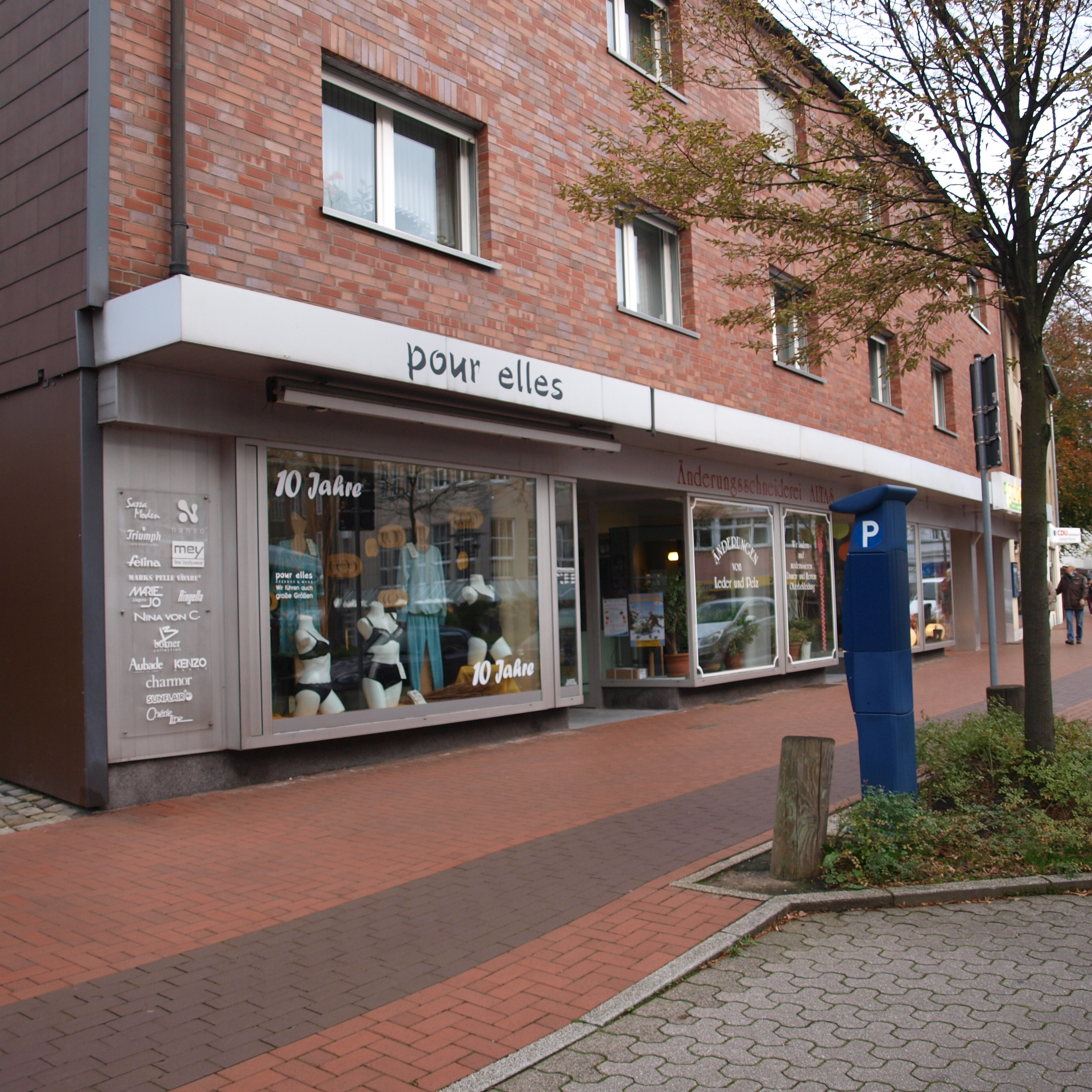 Stolpersteinlage Biesenkamp 6 in Castrop-Rauxel